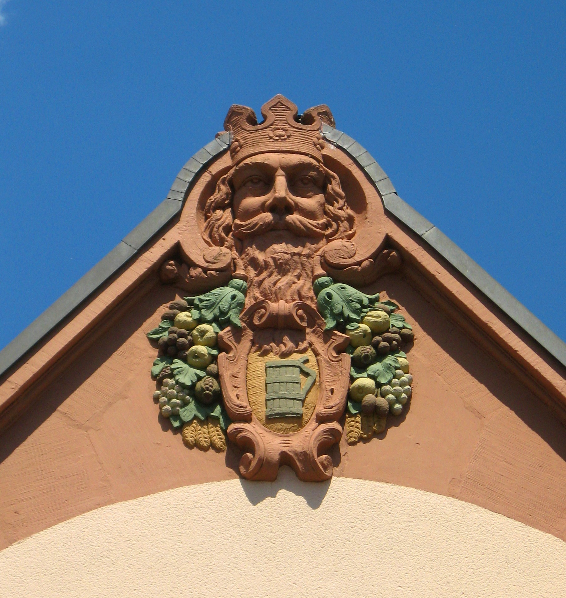 Haus Göbenstraße Dillingen